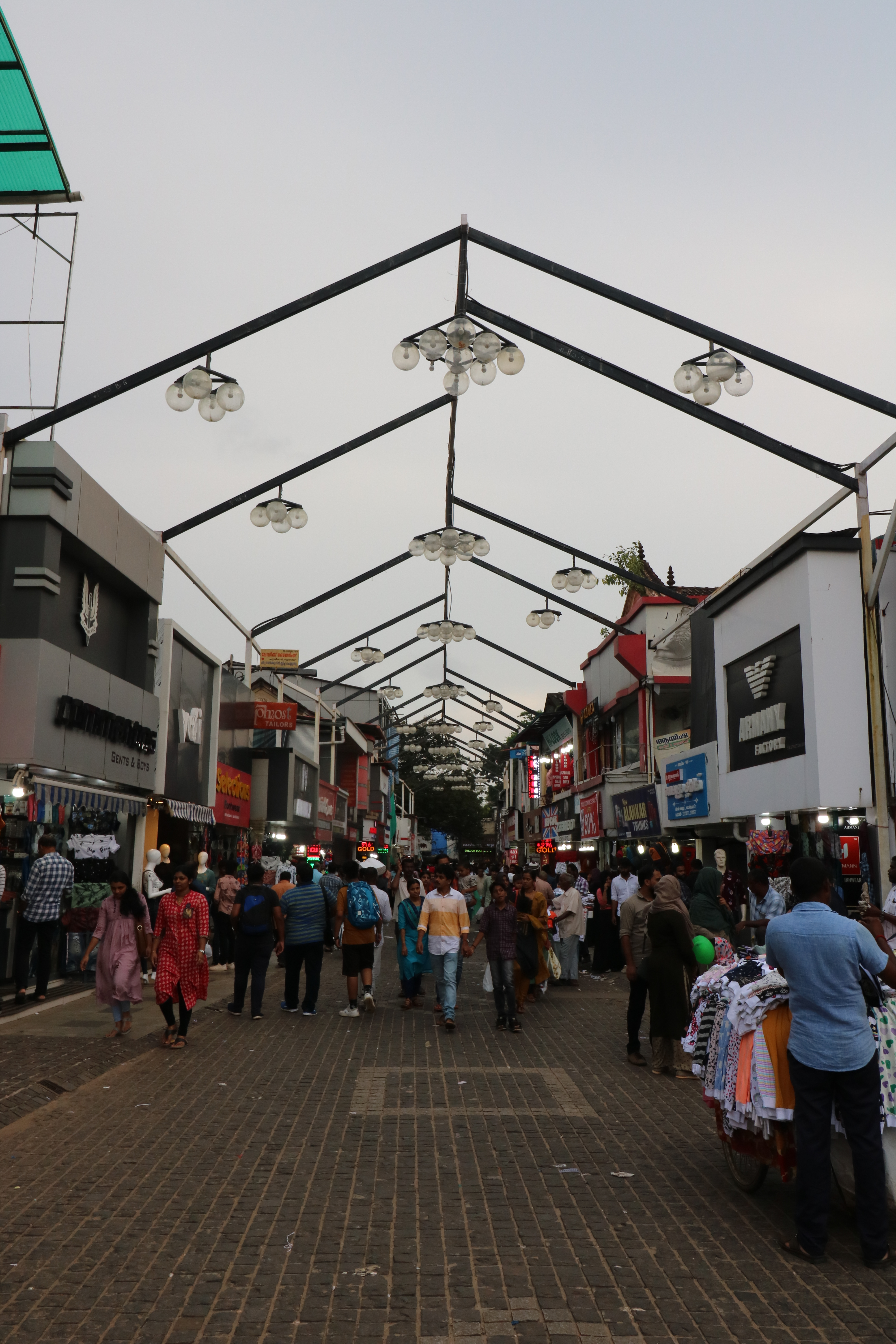 മിഠായിത്തെരുവ്, കോഴിക്കോട്, കേരളം